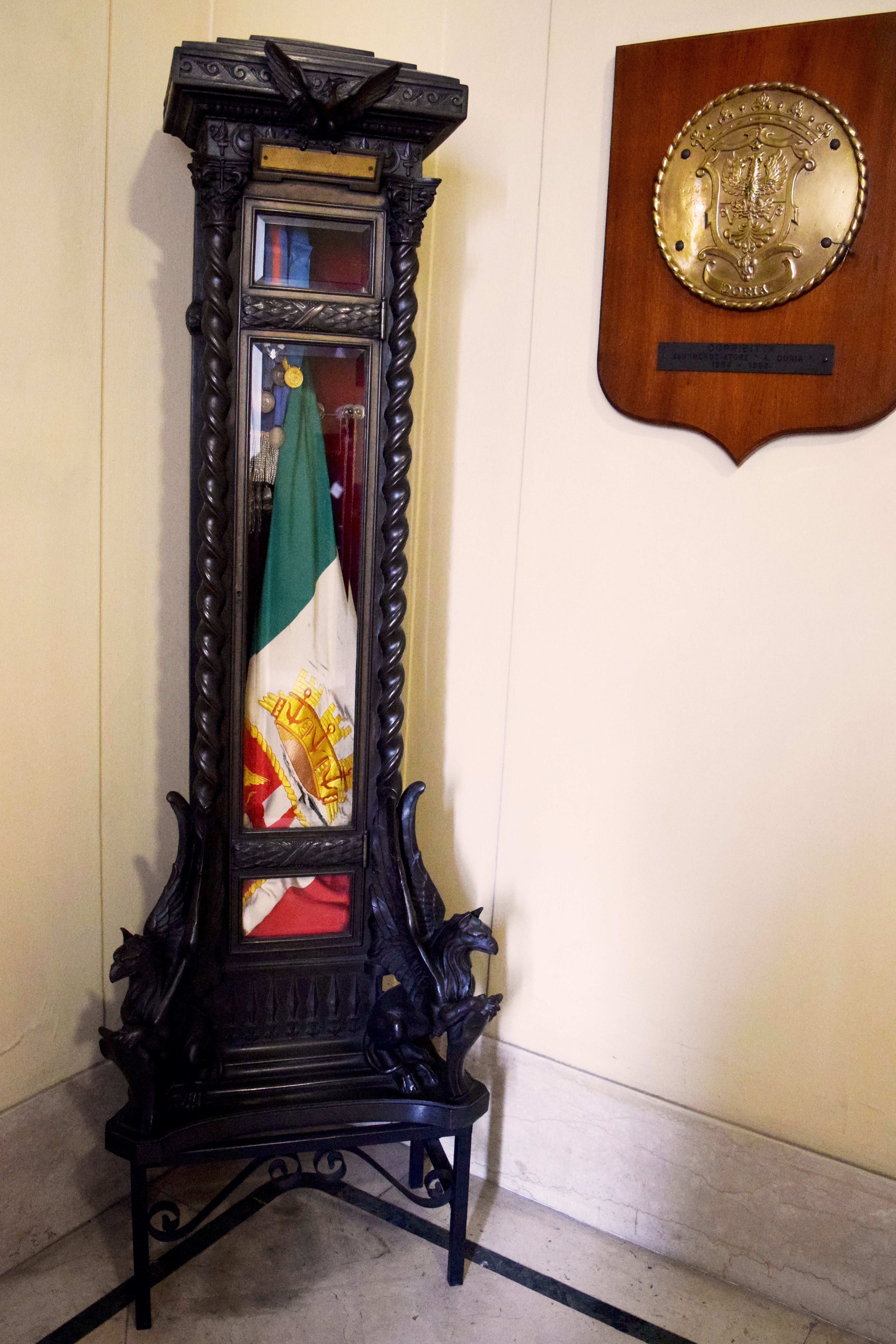 Copribitta dell'incrociatore Andrea Doria in esposizione a Palazzo Marina a Roma